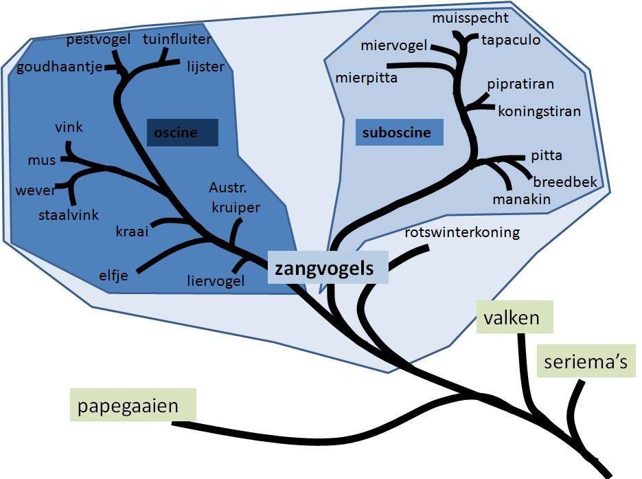 stamboom van zangvogels en verwanten volgens Hackett et al 2008